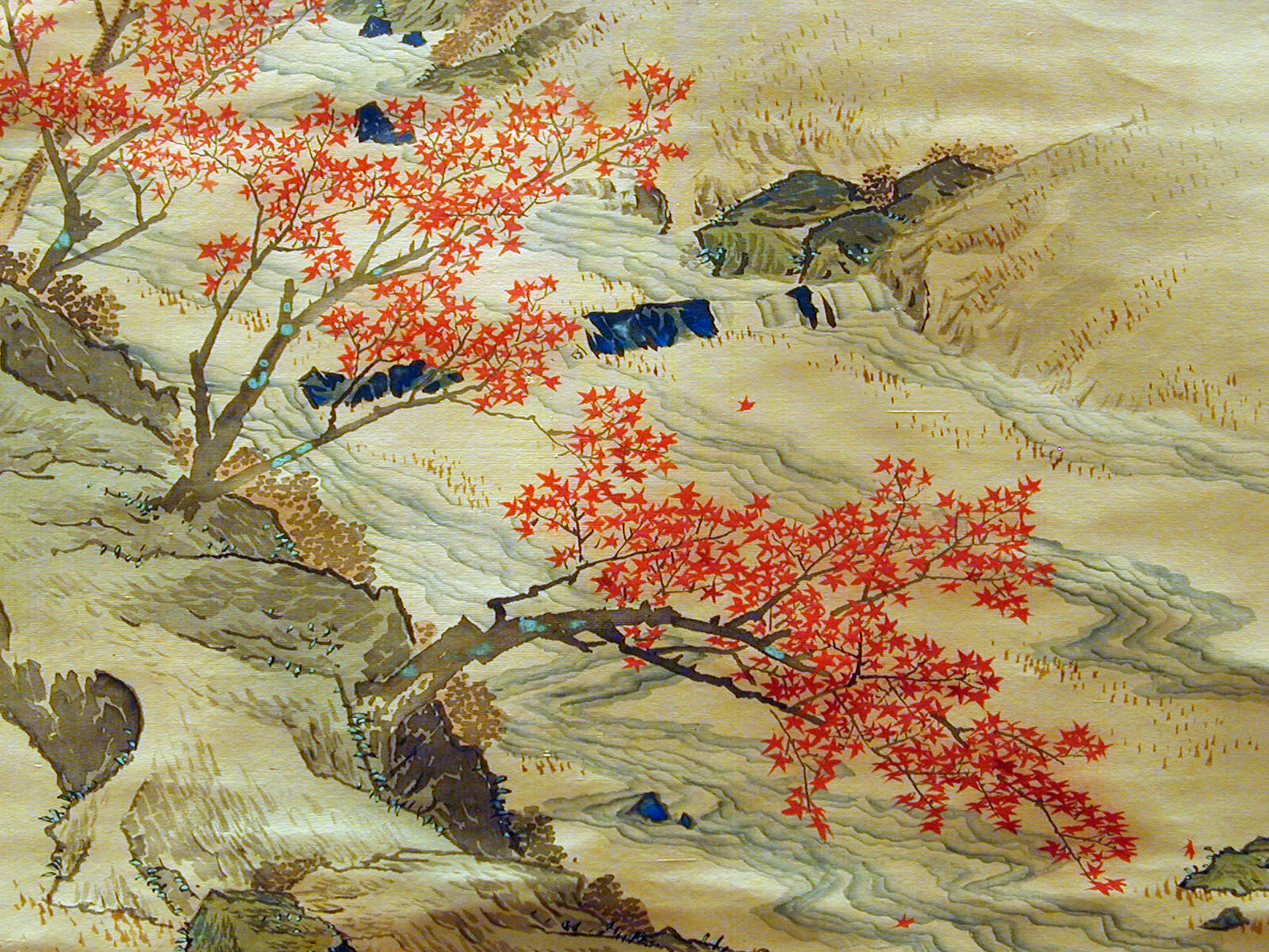 Le voyage de Narihira vers l'Est Maruyama Okyo (1733-1795) Epoque Edo, daté de 1780 encre et couleurs sur soie Musée Guimet